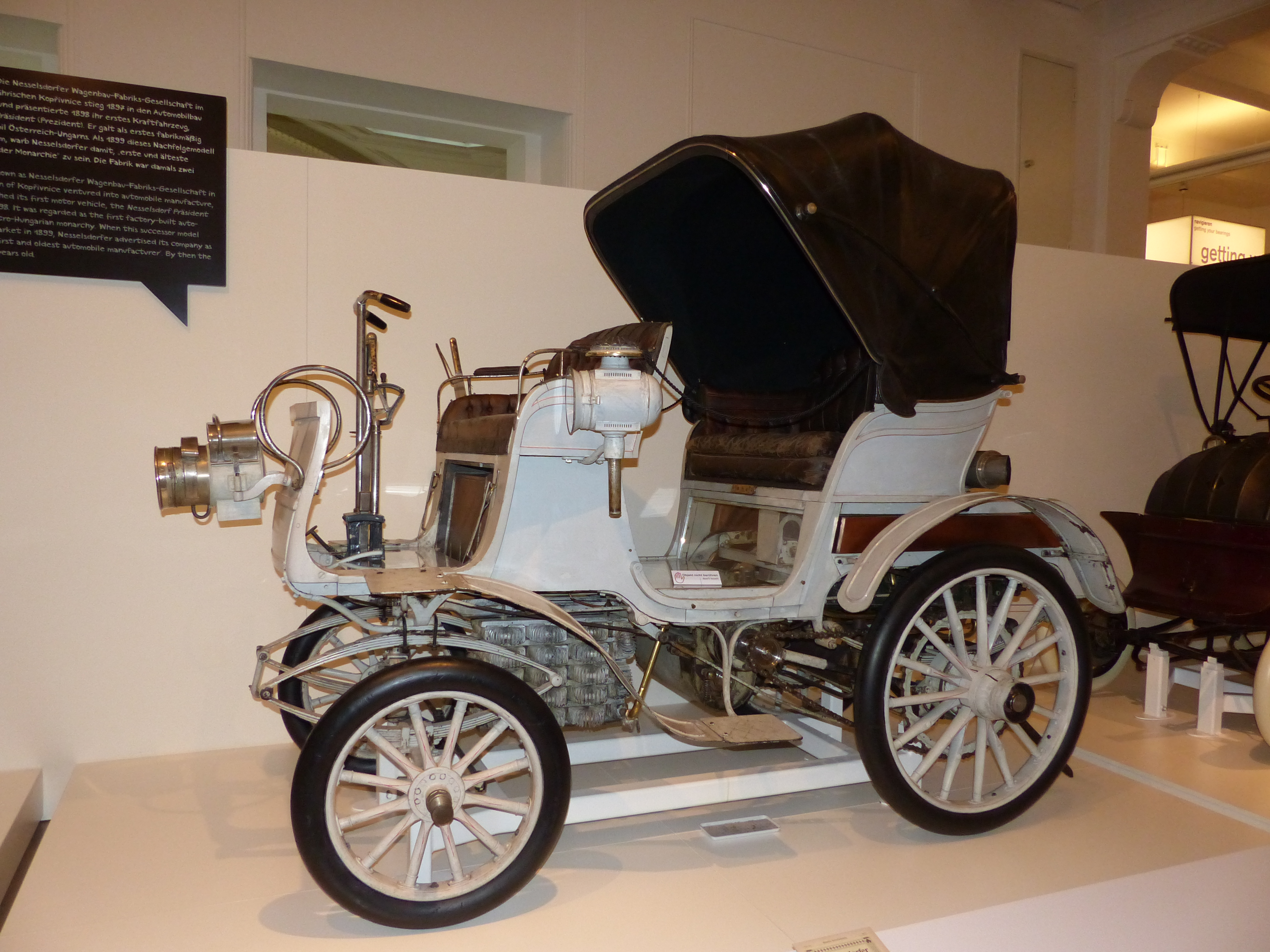 Nesselsdorf Präsident-Nachfolger, 1899-1900; Exponat im Technischen Museum Wien